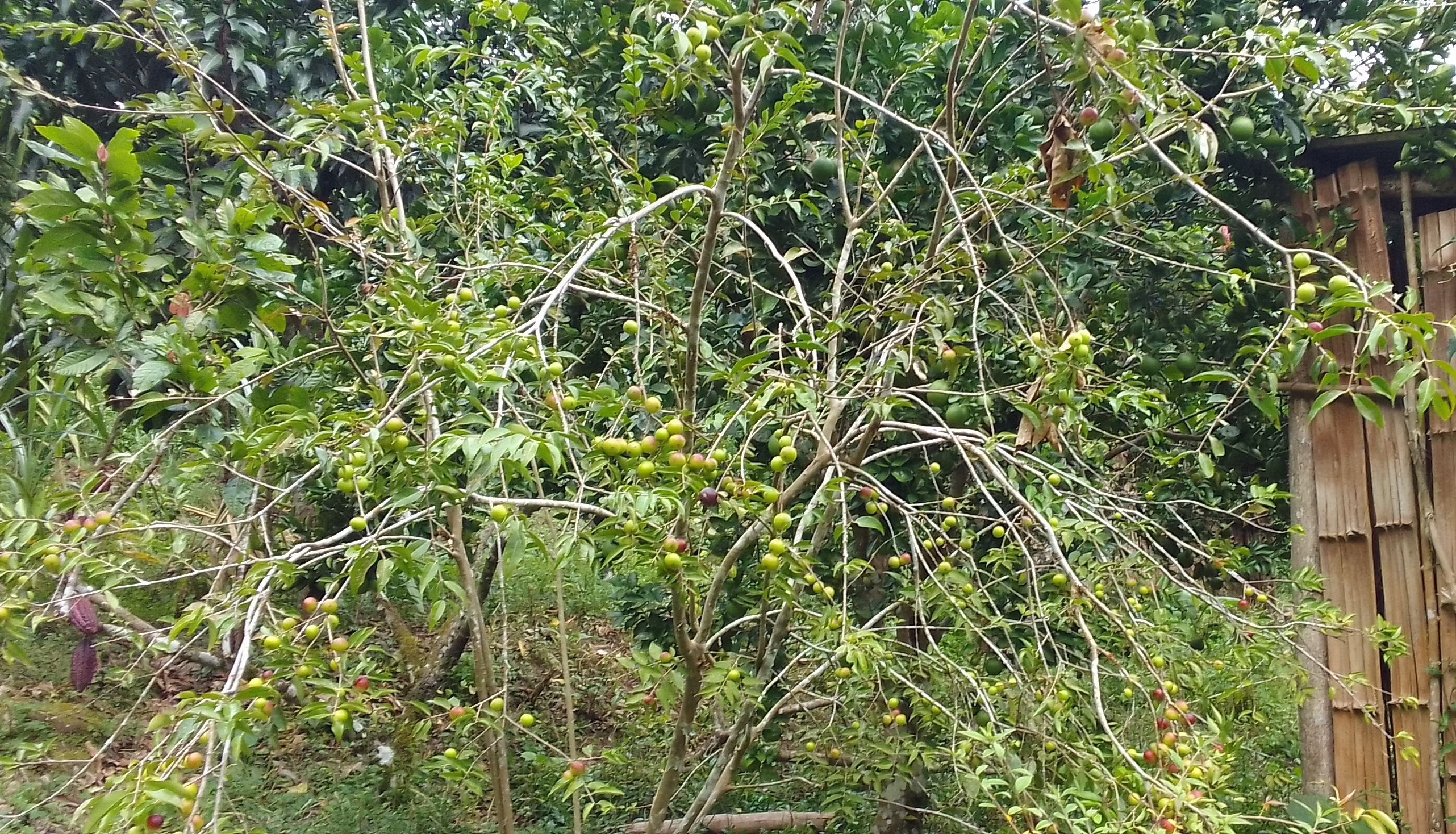 Camu Camu